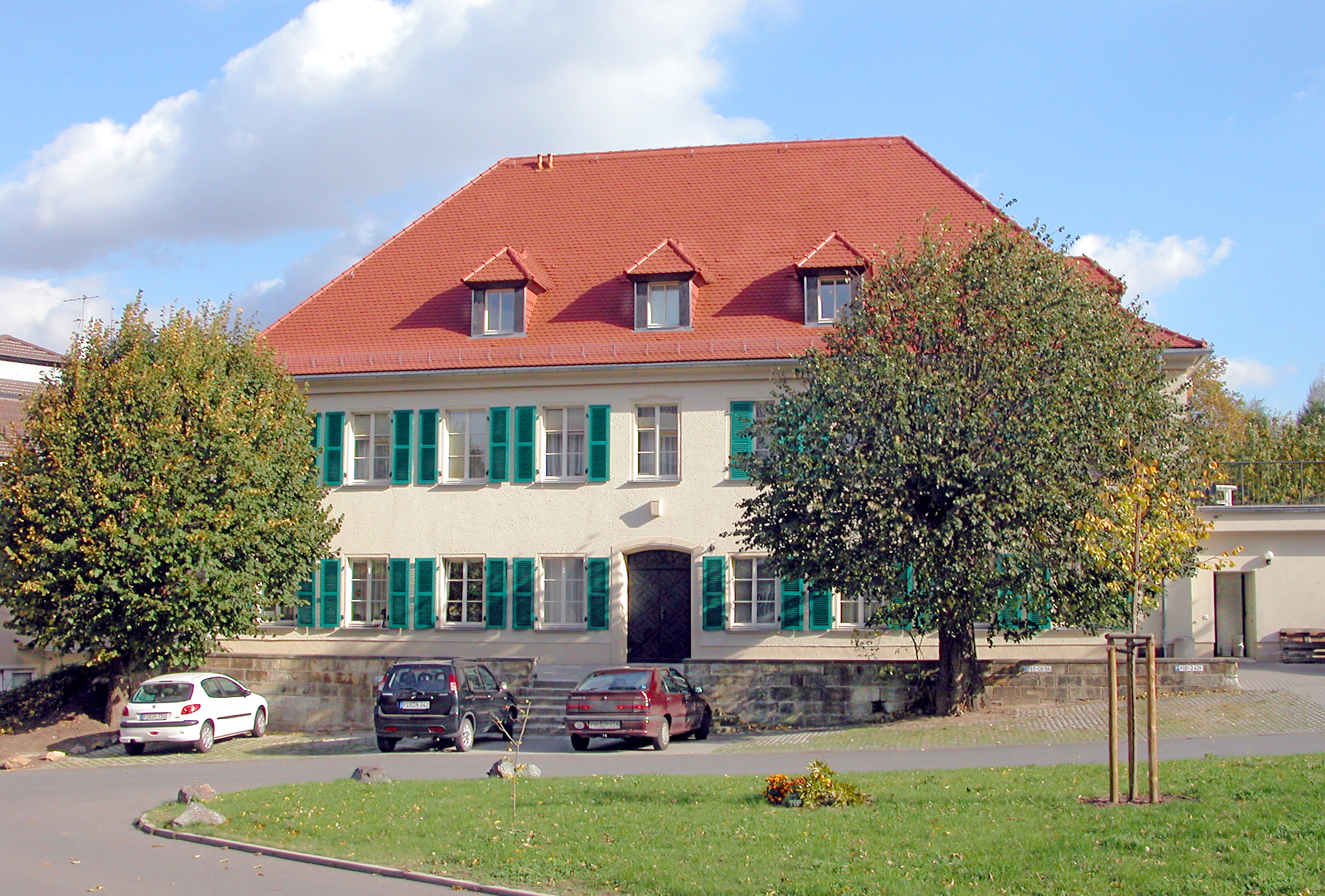 27.10.2006 01809 Köttewitz (Dohna), Köttewitz Nr. 8 (GMP: 50.938324,13.872012): Herrenhaus (vermutl. 17. Jh.) des ehemaligen Ritterguts. Letzter Umbau 1939. Das Rittergut war im Besitz unterschiedlicher Adelsfamilien, darunter von Carlowitz, von Bünau und von Buchner. 1870 wurde es von der königlichen Familie gekauft. Nach 1945 Tuberkuloseheim, ab 1967 Altenpflegeheim, das seit 1992 von der Volkssolidaität betrieben wird. [DSCN12311.TIF]20061027100DR.JPG(c)Blobelt